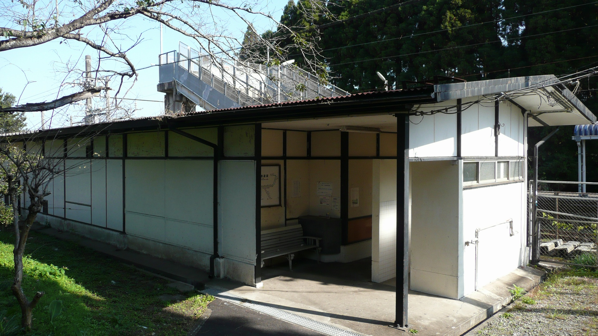 2007/12/2 日豊本線日向沓掛駅の駅舎。撮影後リサイズ。 撮影&投稿者:Sanjo